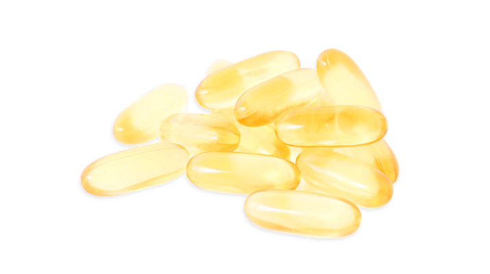 Omega-3-Fettsäuren als Softgel mit 180 mg EPA und 120 mg DHA pro Stück